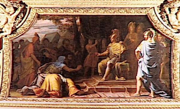 ALEXANDRE RECEVANT UNE AMBASSADE D’INDIENS ; Salon : Salon de Mercure, Grands appartements du Château de Versailles Emplacement : voussure ; est